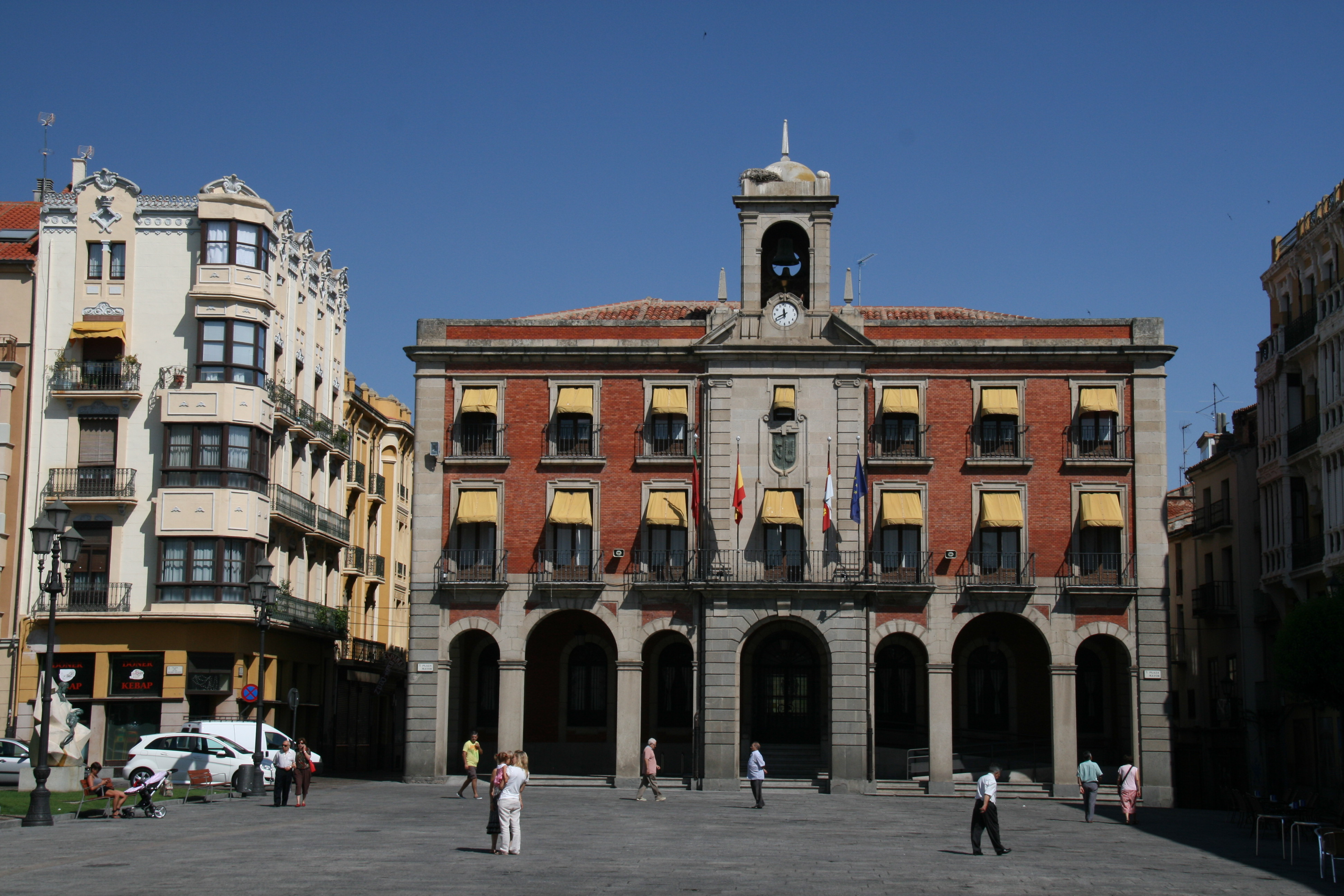 Casa Consistorial de (Plaza Mayor de Zamora)